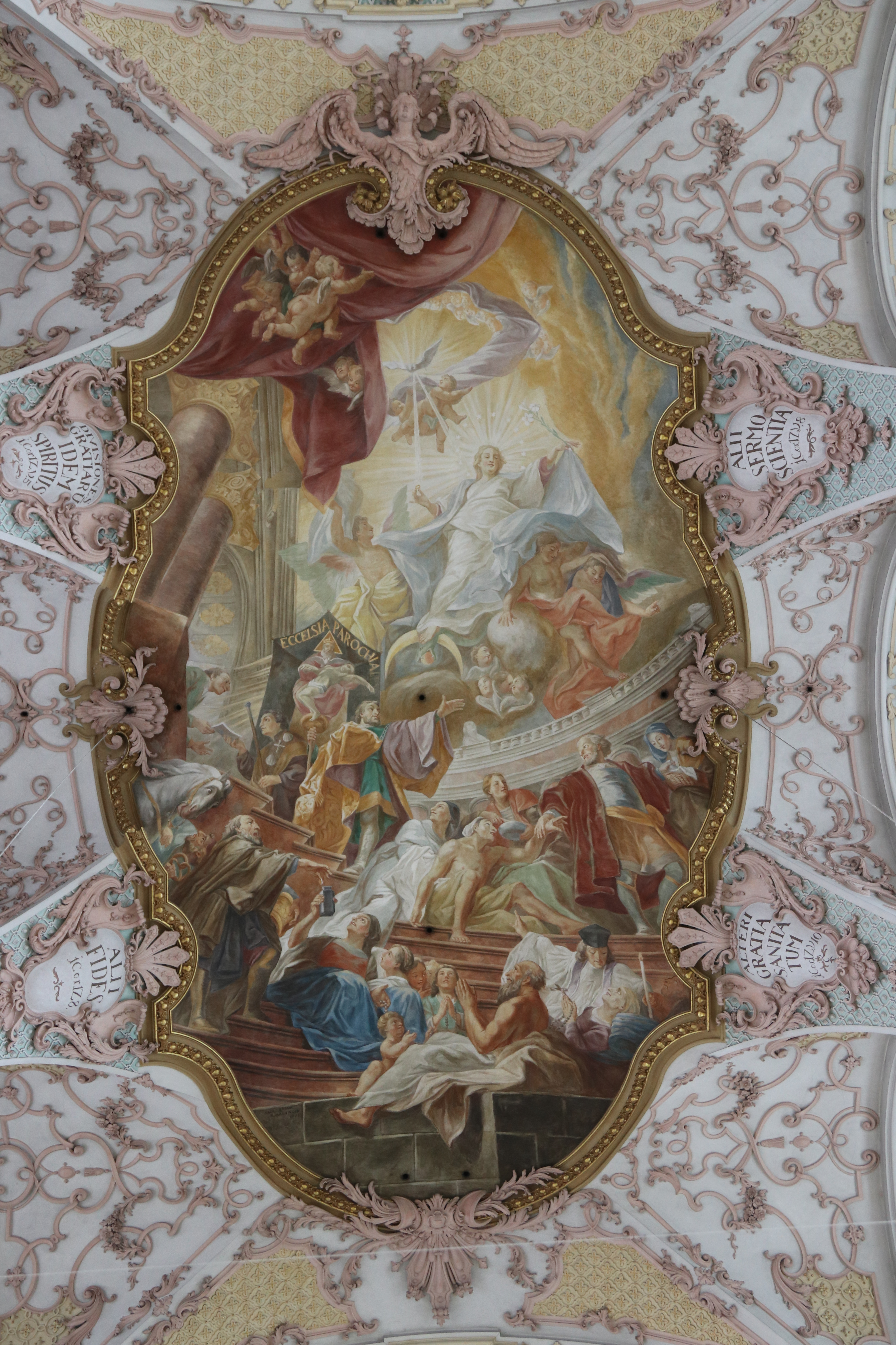 Heilig Geist Kirche München, die erste Kirche außerhalb der Münchner Stadtmauern.Deckenfresko der Gebrüder Asam, 1727